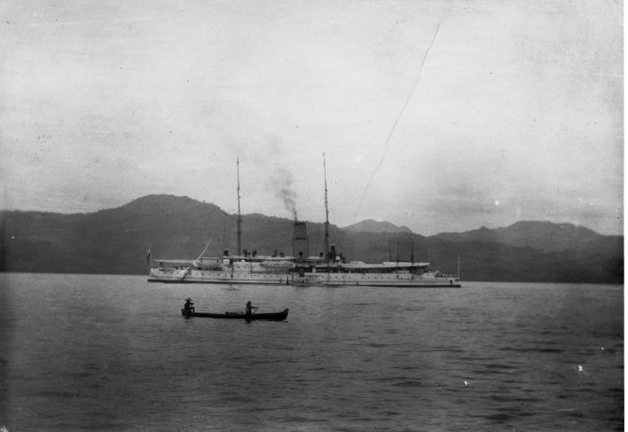 Foto. Het Marineschip de Wilhelmina op de reede van Ambon